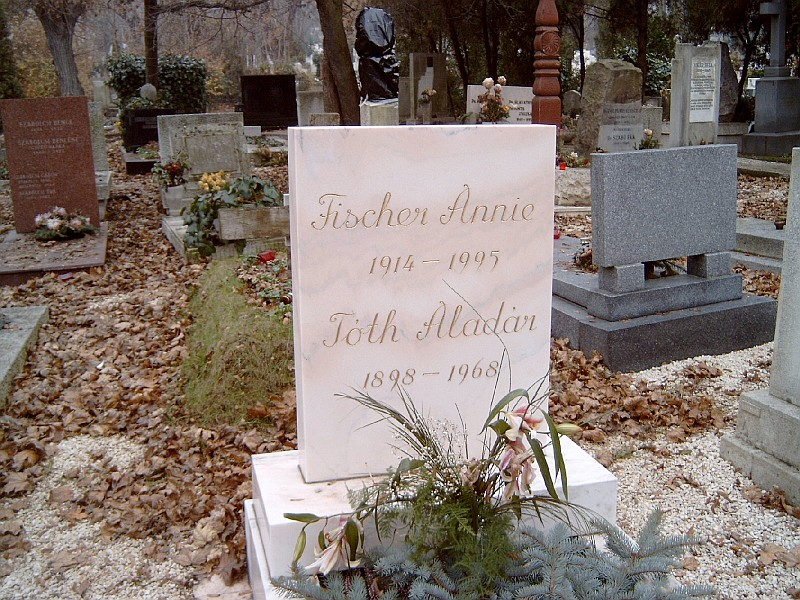 Fischer Annie és Tóth Aladár sírja Budapesten. Farkasréti temető: 6/1-1-26.